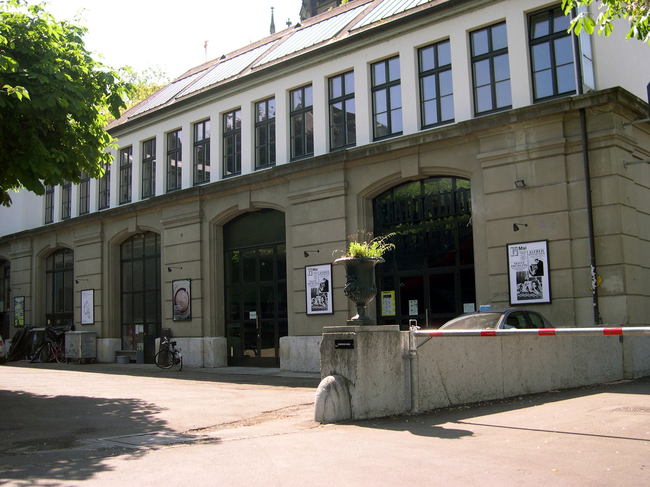 Ehemalige Skulpturenhalle der Basler Kunsthalle. Genutzt für die Abgusssammlung der Basler Öffentlichen Kunstsammlung von 1887 bis 1927, seit 1998 Domizil des Stadtkino Basel.